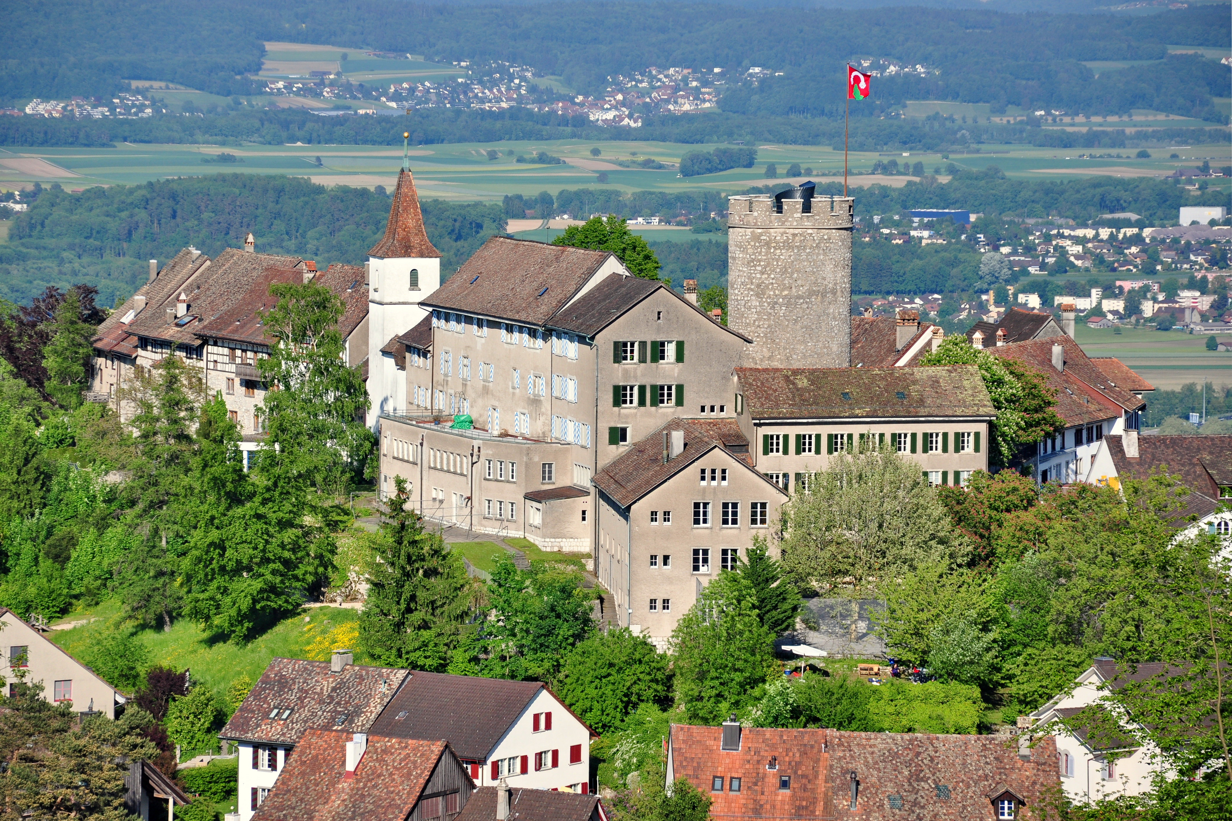 Schloss Regensberg as seen from Lägern (Switzerland)